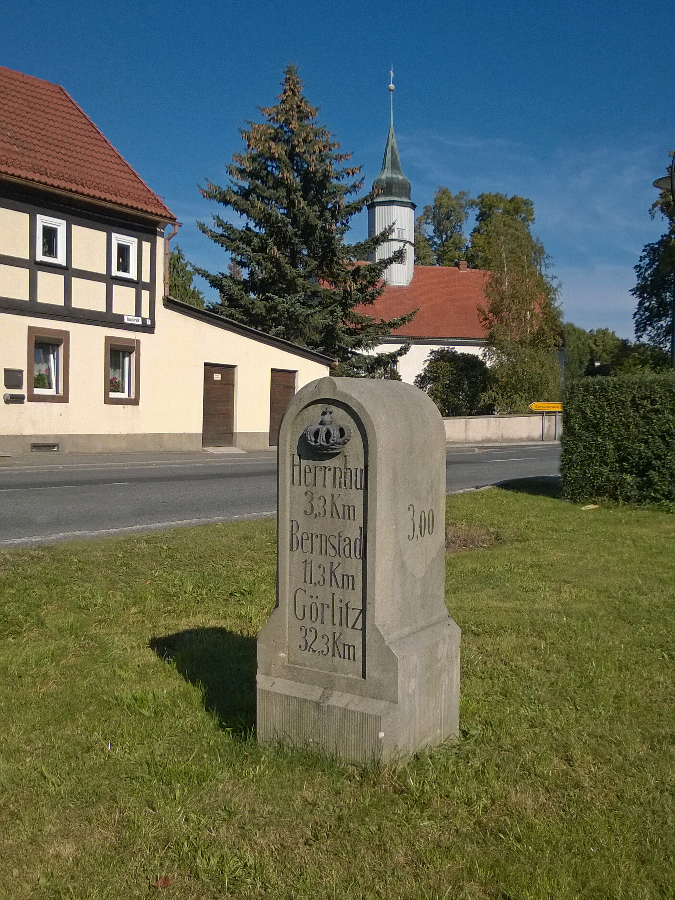 königlich-sächsischer Ganzmeilenstein als Kilometerstein an der S 144 in Ruppersdorf